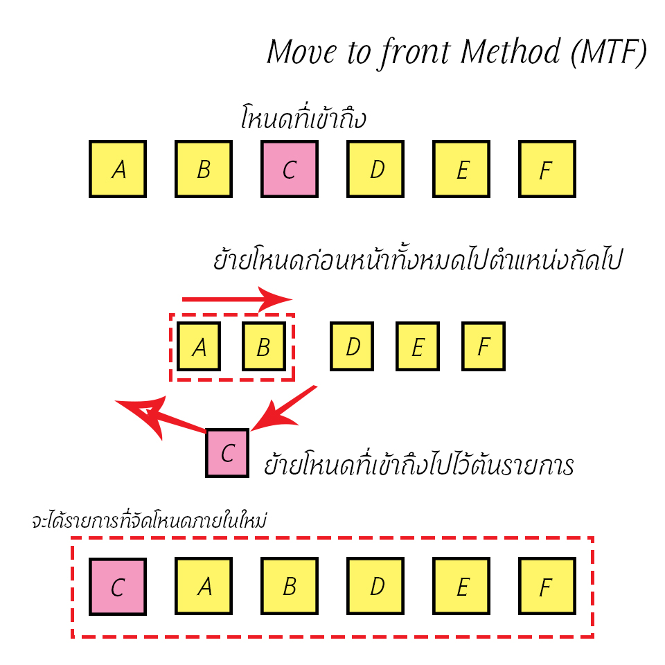 ขั้นตอนวิธีจัดโหนดภายในรายการแบบ MTF